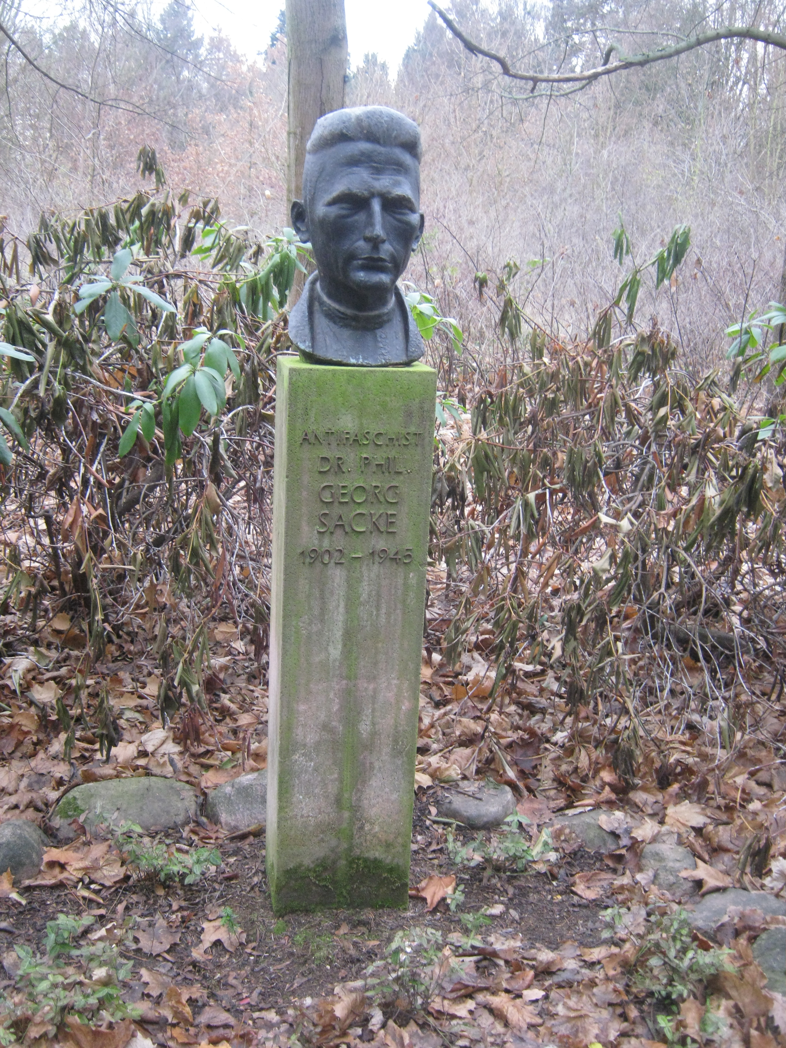 Auf dem Gelände „Prager Straße 224–226“, welches unter den Namen „Humanitas Heim für gebrechliche Kinder“ oder „Orthopädische Klinik Dr. Georg Sacke“ bekannt war, befindet sich die Georg-Sacke-Büste zum Gedenken an den Historiker und antifaschistischen Widerstandskämpfer Georg Sacke.